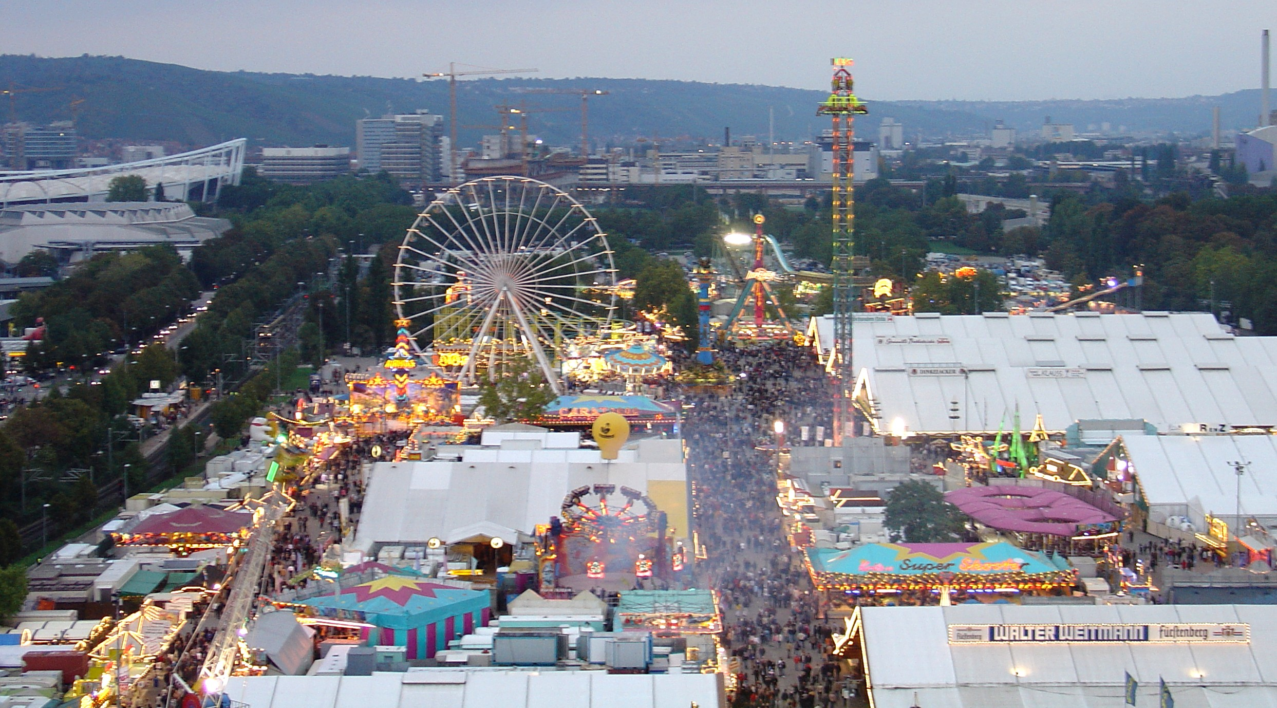 Festbetrieb des Cannstatter Volksfestes vom Riesenrad aus aufgenommen